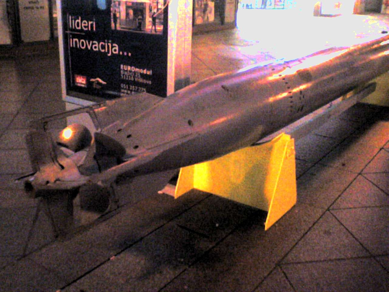 Pravi torpedo na riječkom Korzu povodom izložbe inovacija 2006. godine.